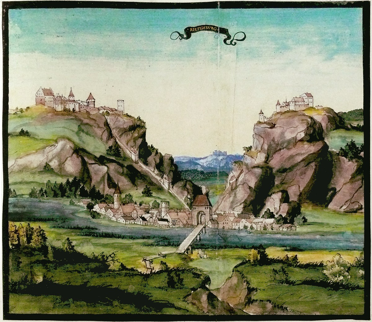 Frühe Ansicht von Riedenburg aus dem Reisealbum von Pfalzgraf Ottheinrich